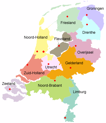 Kaart provincies van Nederland. Zelf gemaakt, vrij te gebruiken. Een vergelijkbaar kaartje in het Engels: nl::en:Image:Netherlands_map_small.png